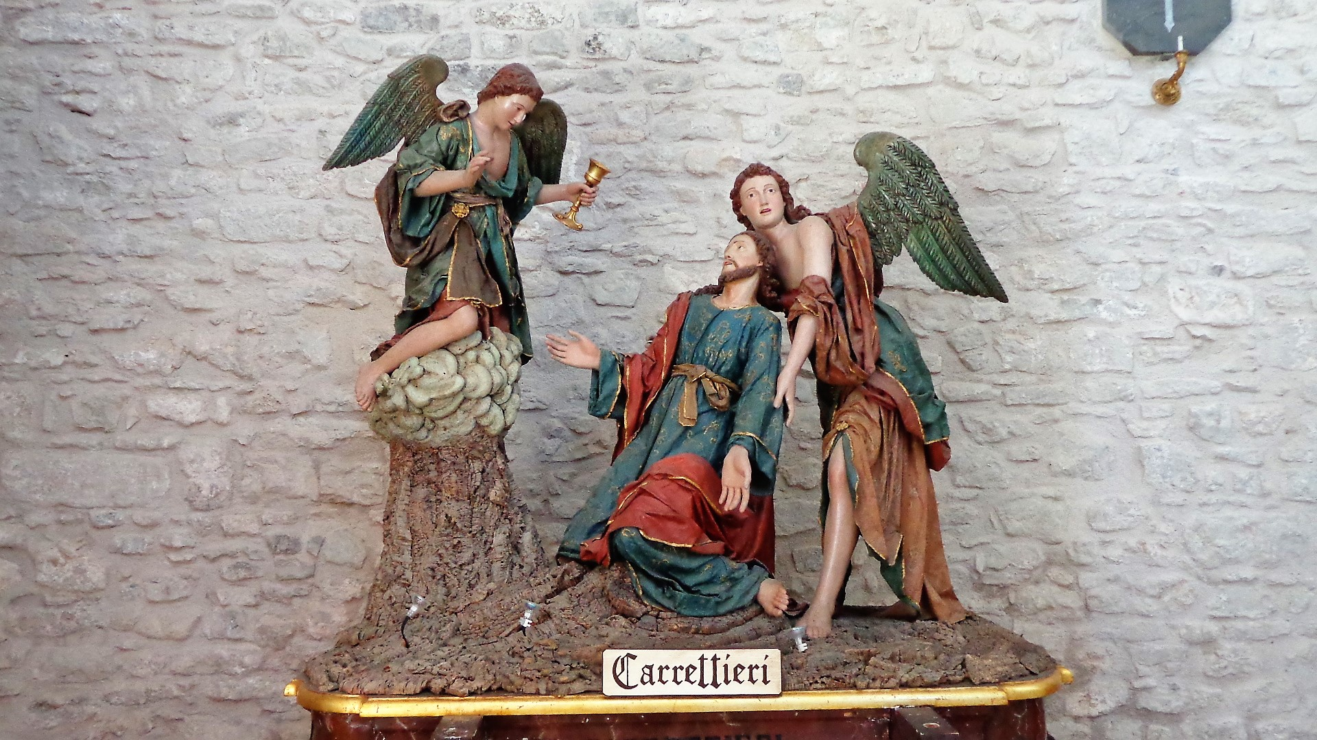 Misteri